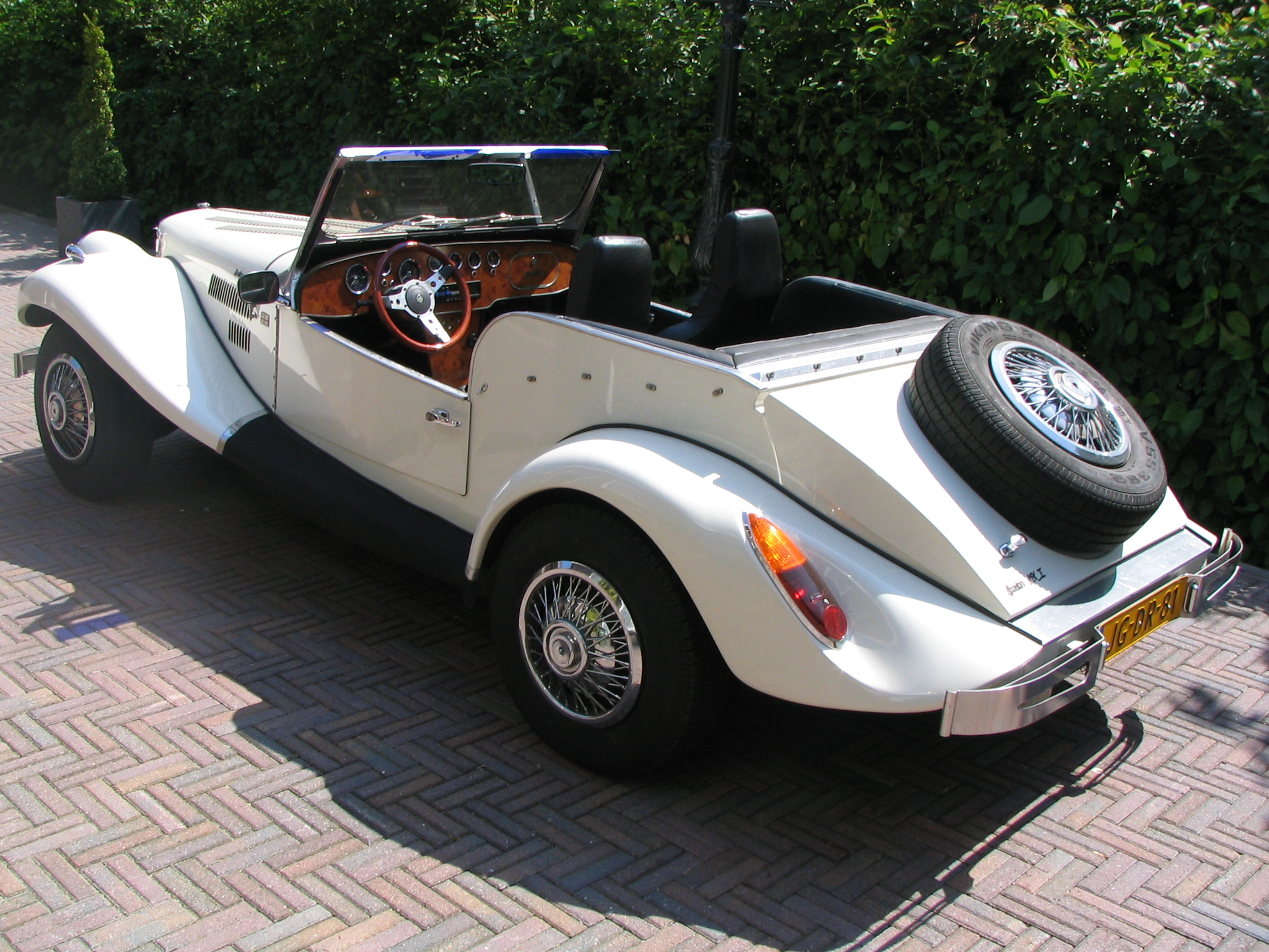 Spartan MK II